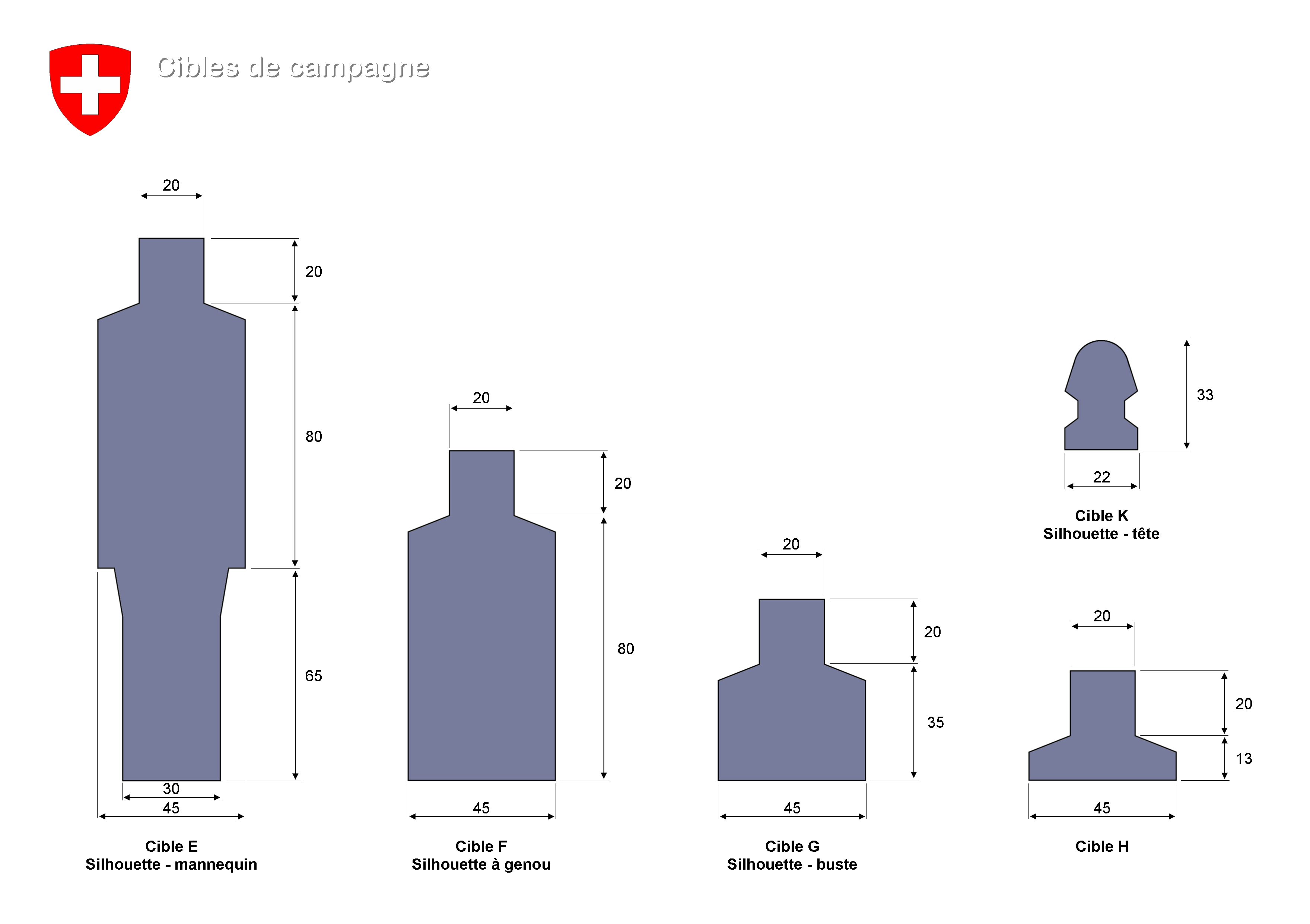 Cibles de campagne, armée suisse